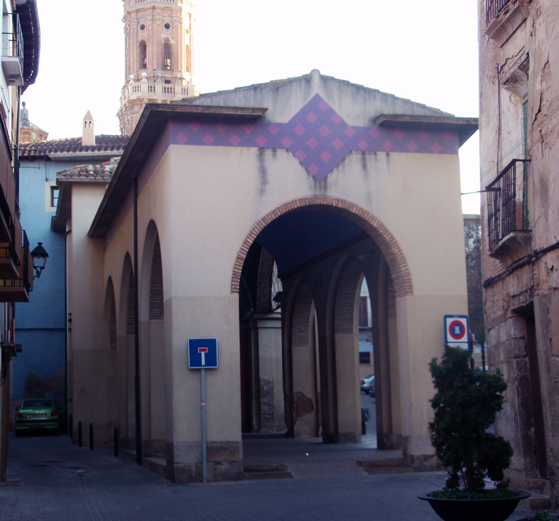 Exterior del Convento de San Antón (Tudela) en 2010 (restauración de la estructura en la década de 1990)